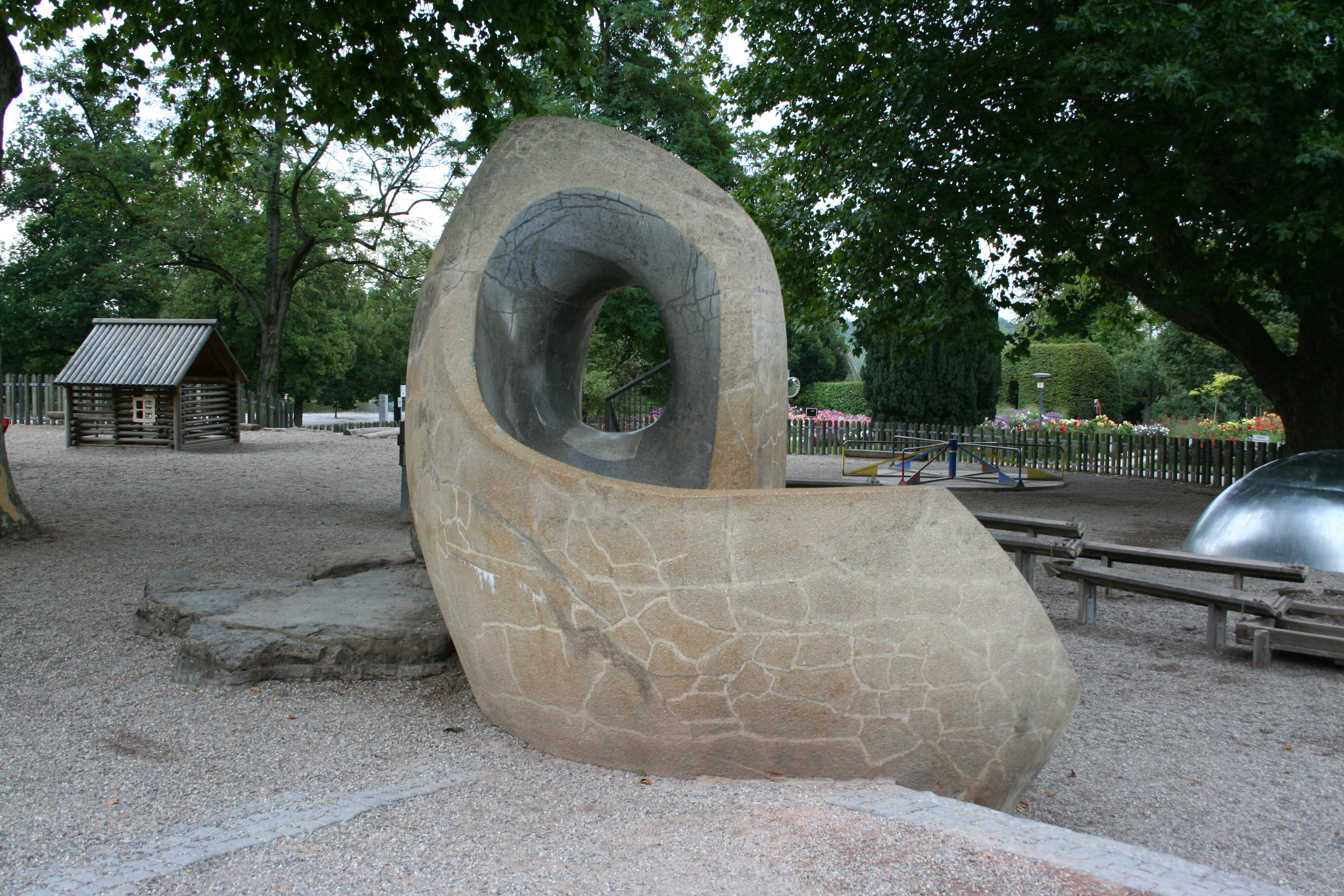 Kunstwerk "Kinderrutschbahn" im Höhenpark Killesberg in Stuttgart, Baden-Württemberg, Deutschland. Geschaffen 1961 aus dem Werkstoff Beton vom Künstler Erich Glauer.